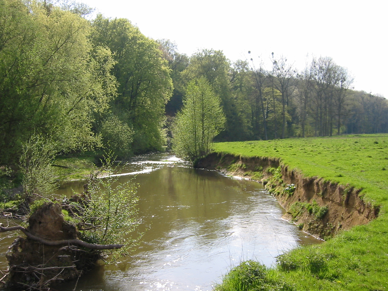 Geul river. Eigen foto